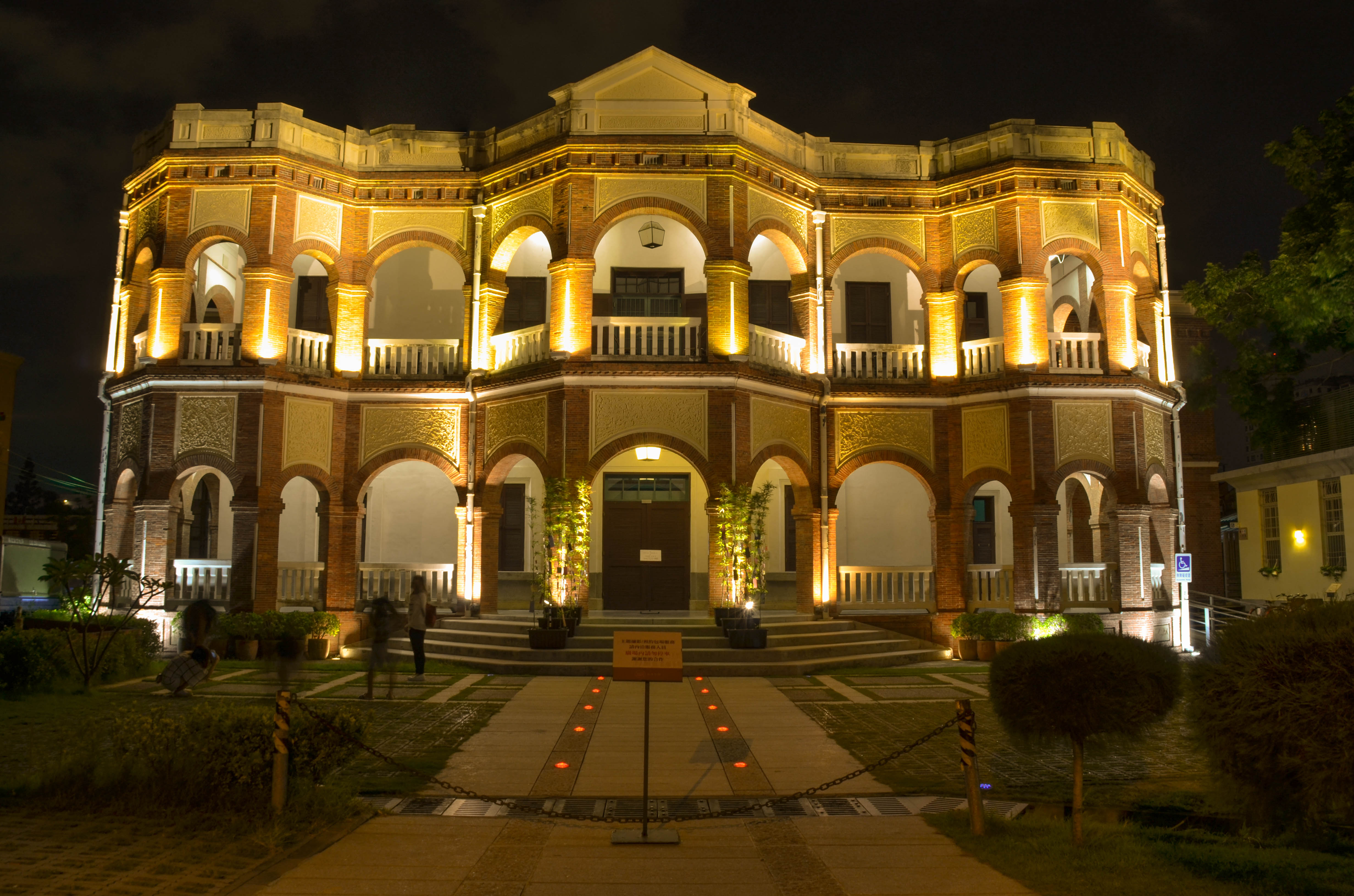 中文（台灣）: 矗立在黑夜中的知事官邸